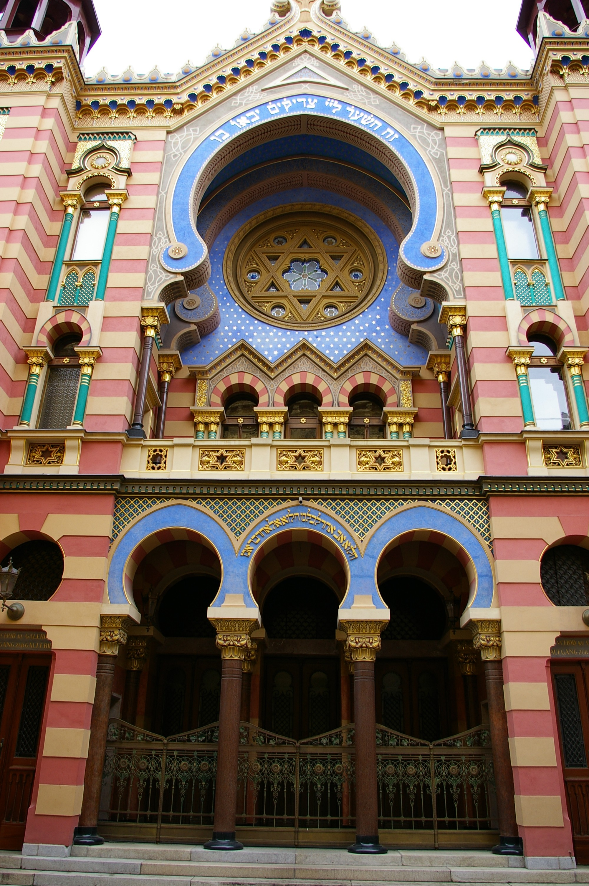 Synagogue jubilaire de Prague